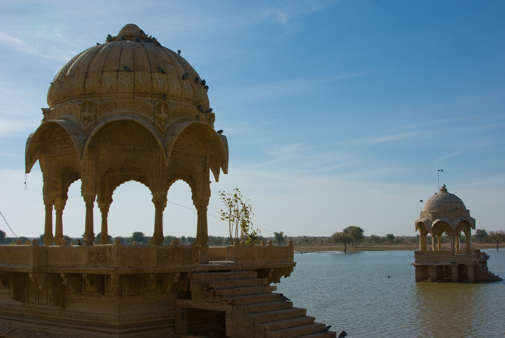 राजस्थानी: जैसलमेर